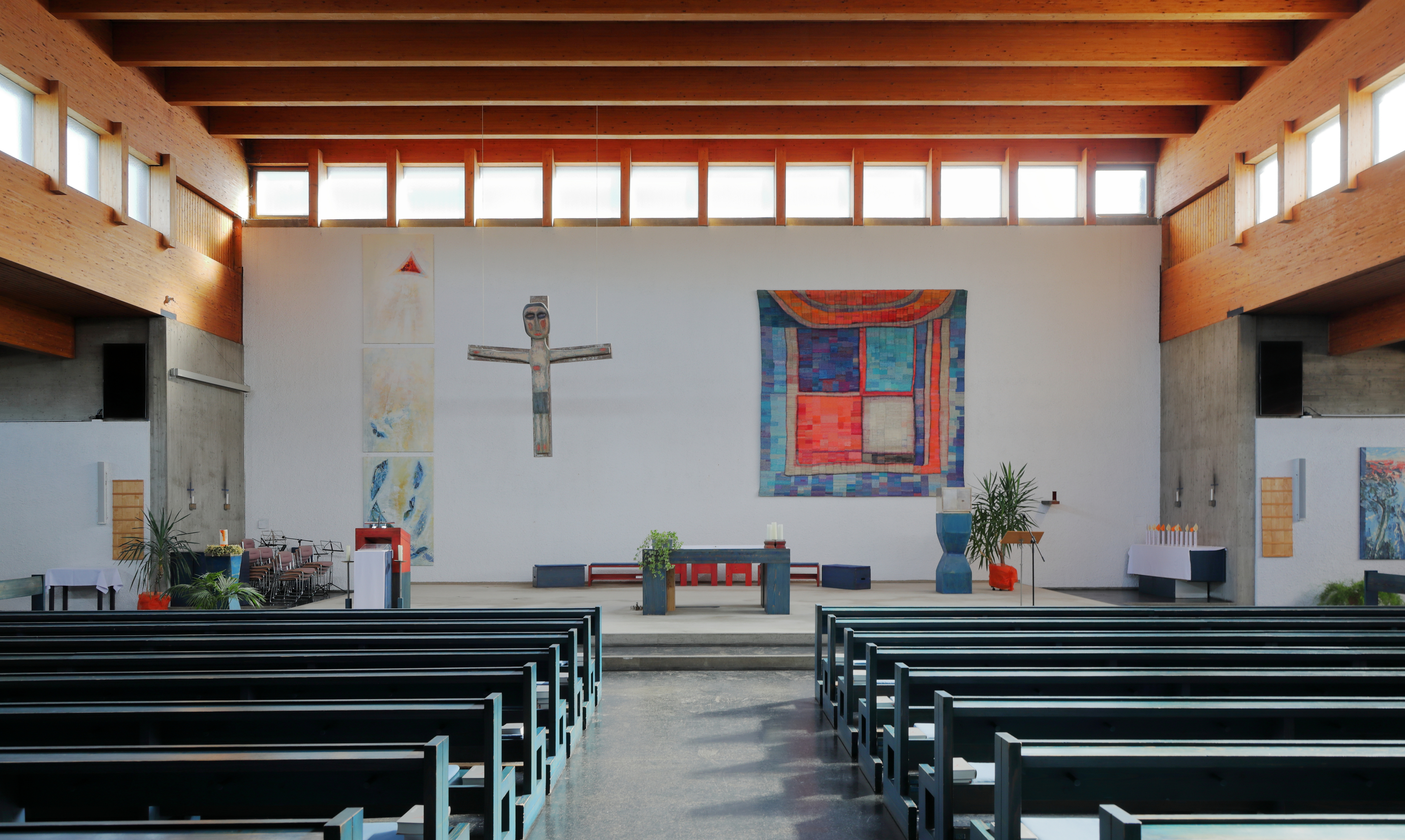 Innenansicht in Richtung Altar in der röm.-kath. Pfarrkirche hl. Berthold in Neuzeug, ein Ortsteil der oberösterreichischen Marktgemeinde Sierning.Der Spatenstich für die nach Plänen von Gottfried Nobl und Othmar Kainz errichtete Pfarrkirche erfolgte am 17. August 1969 und am 24. Oktober 1971 wurde die Kirche durch Bischof Franz Zauner feierlich geweiht. Für die Innenausstattung der Kirche wurde die Künstlerin Lydia Roppolt beauftragt.